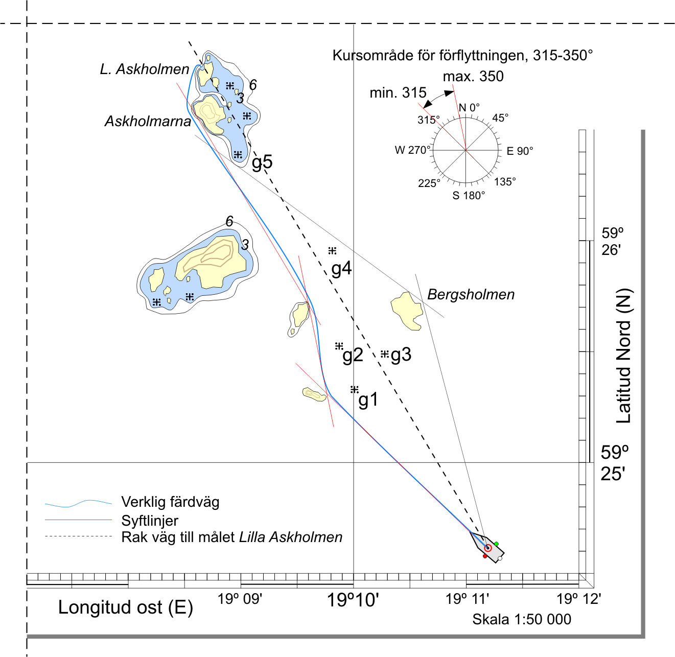 Exempel på rutt med användning av angiva öar i sjökortet och grovavläsning av kompasskursen.